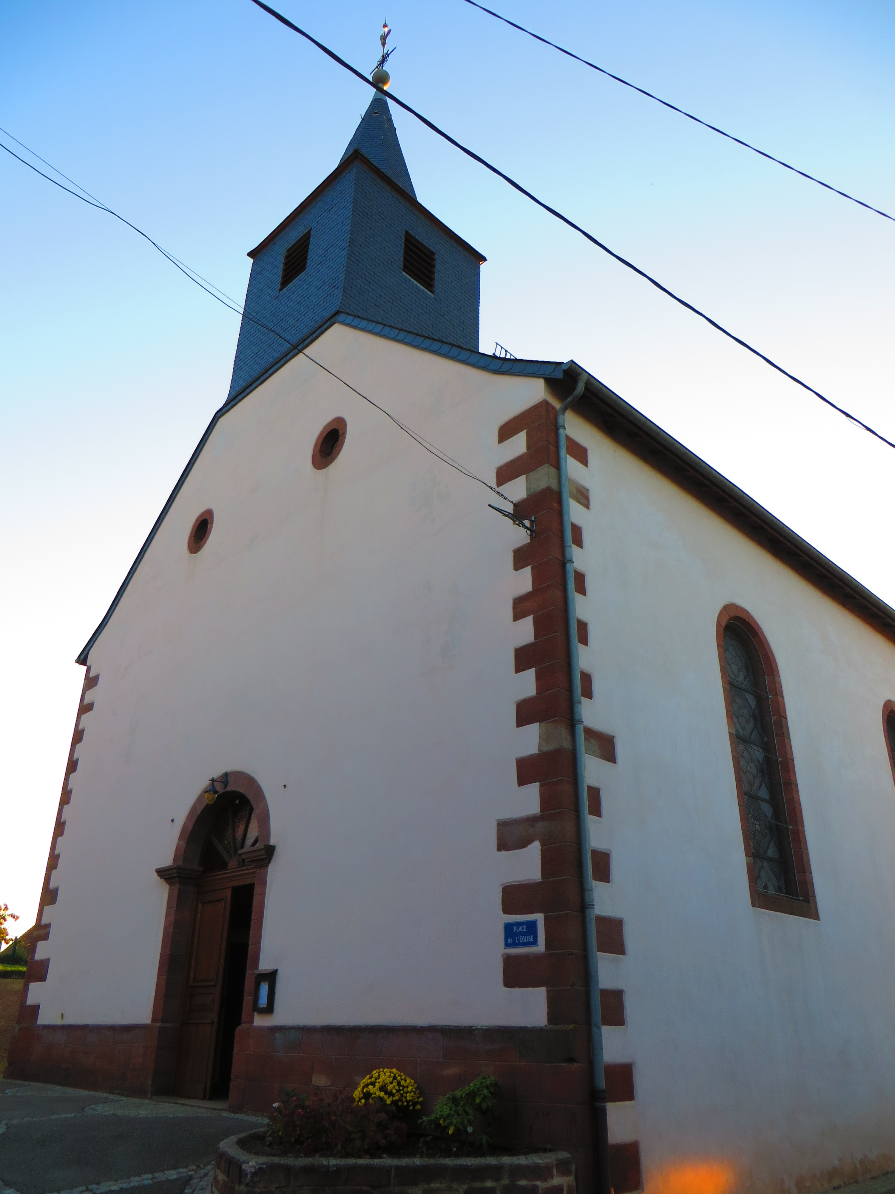 Hultehouse Église Saint-Wendelin